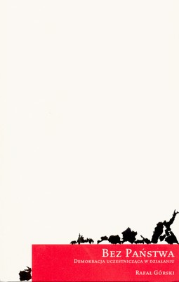 Okładka książki Rafała Górskiego Bez państwa, w całości udostępnionej na licencji Creative Commons.